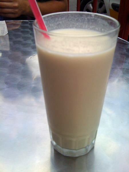 Un vaso de horchata de chufa, con pajita, de la Orxatería Xixona.